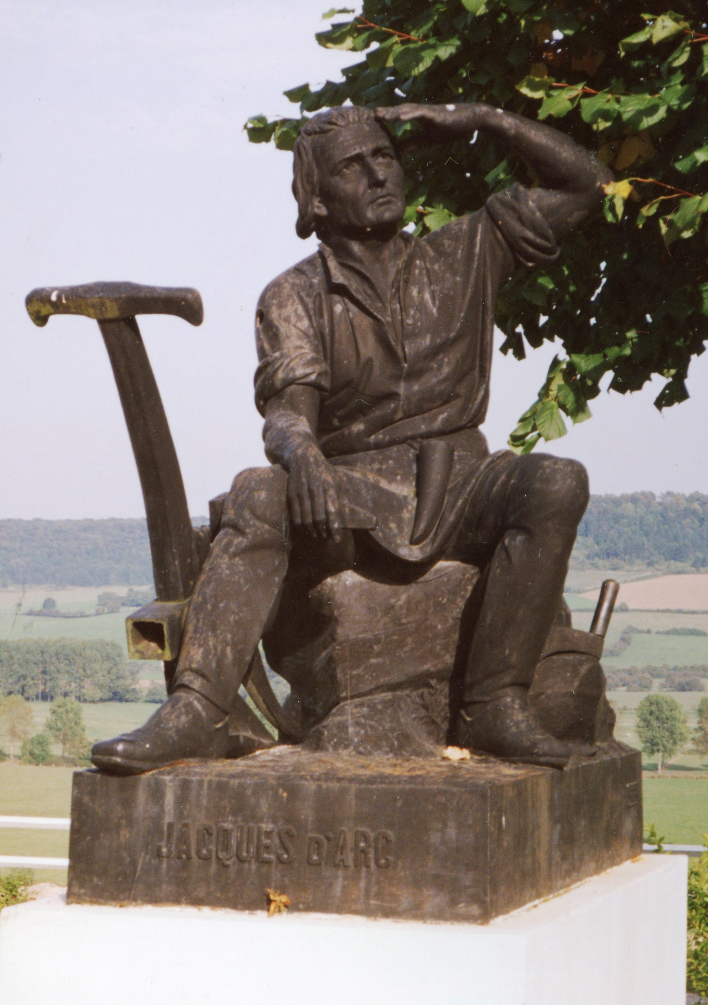 Jacques d'Arc, père de Jeanne la Pucelle. Vue d'artiste par l'Union internationale artistique de Vaucouleurs (Meuse). Statue inaugurée le 6 septembre 1911 sur le parvis de la basilique du Bois-Chenu à Domrémy-la-Pucelle (Vosges). (référence : Bernard Mugnier, La basilique Sainte-Jeanne-d'Arc de Domrémy-la-Pucelle : monument national de la reconnaissance française à Jeanne d'Arc, Langres, Dominique Guéniot éditeur, 2001, 483 p., ISBN 2-87825-216-0, p. 87).